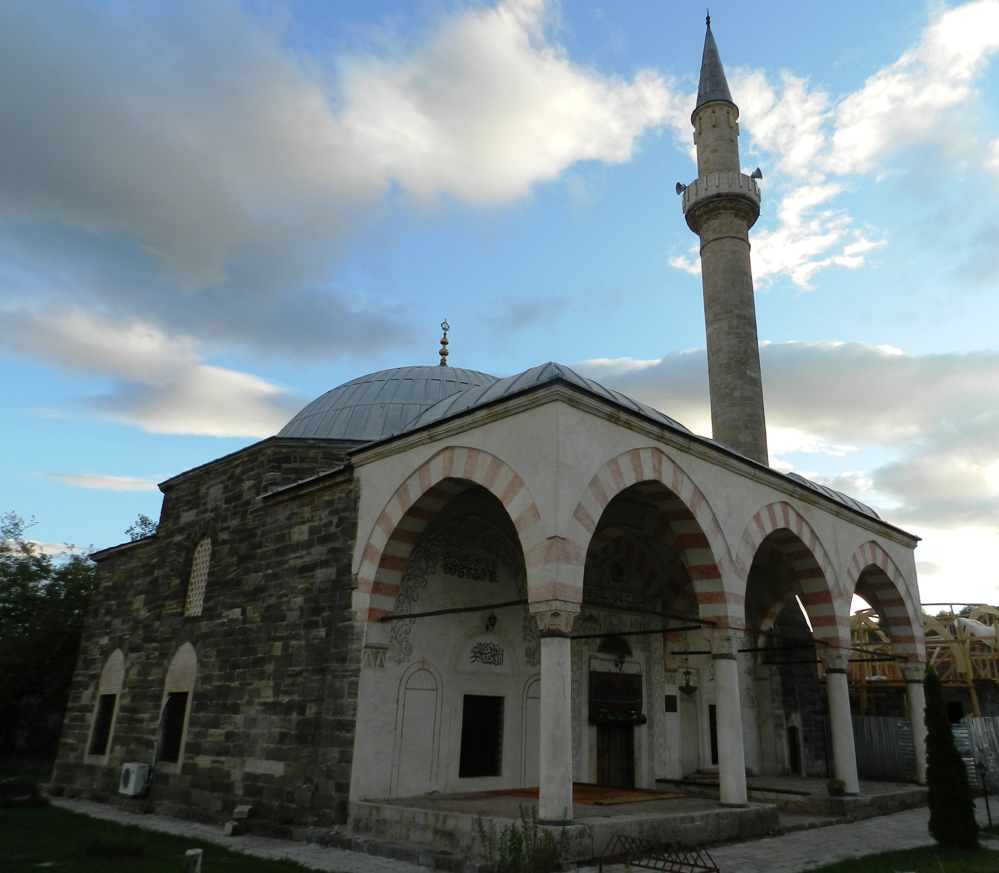 Kompleksi Xhamija e Hadumit